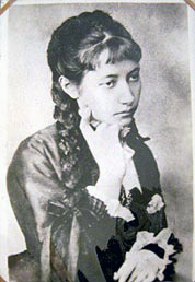 Уляна Кравченко (Юлія Шнайдер).